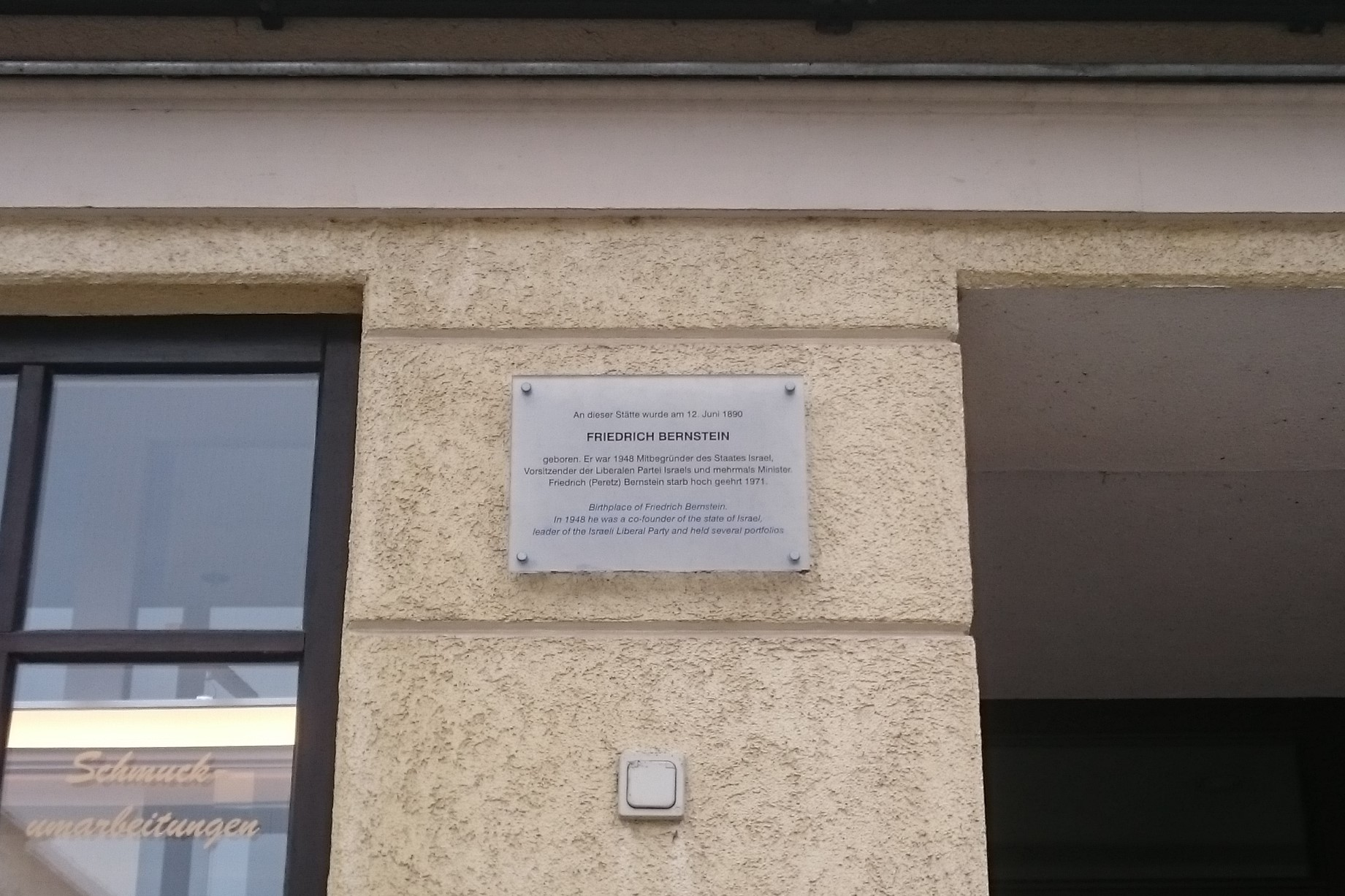 Gedenktafel für den in Meiningen geborenen Friedrich (Peretz) Bernstein, Mitbegründer des Staates Israel.